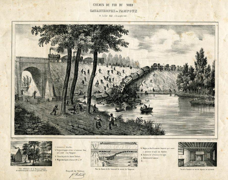 "Chemin de fer du Nord. Catastrophe de Fampoux", lithographie par Félix Robaut. Archives départementales du Pas-de-Calais, 4 J 486/25.